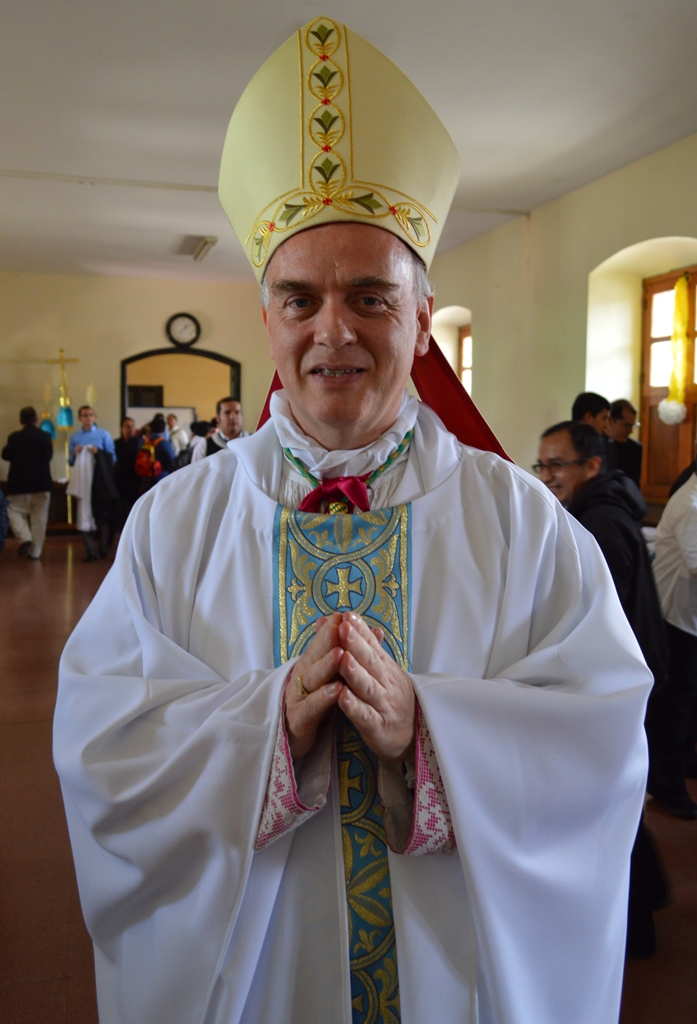 Nuncio del Papa Francisco en Guatemala